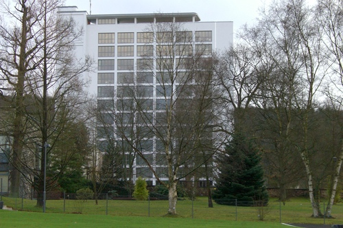 Saarländische Universitäts- und Landesbibliothek